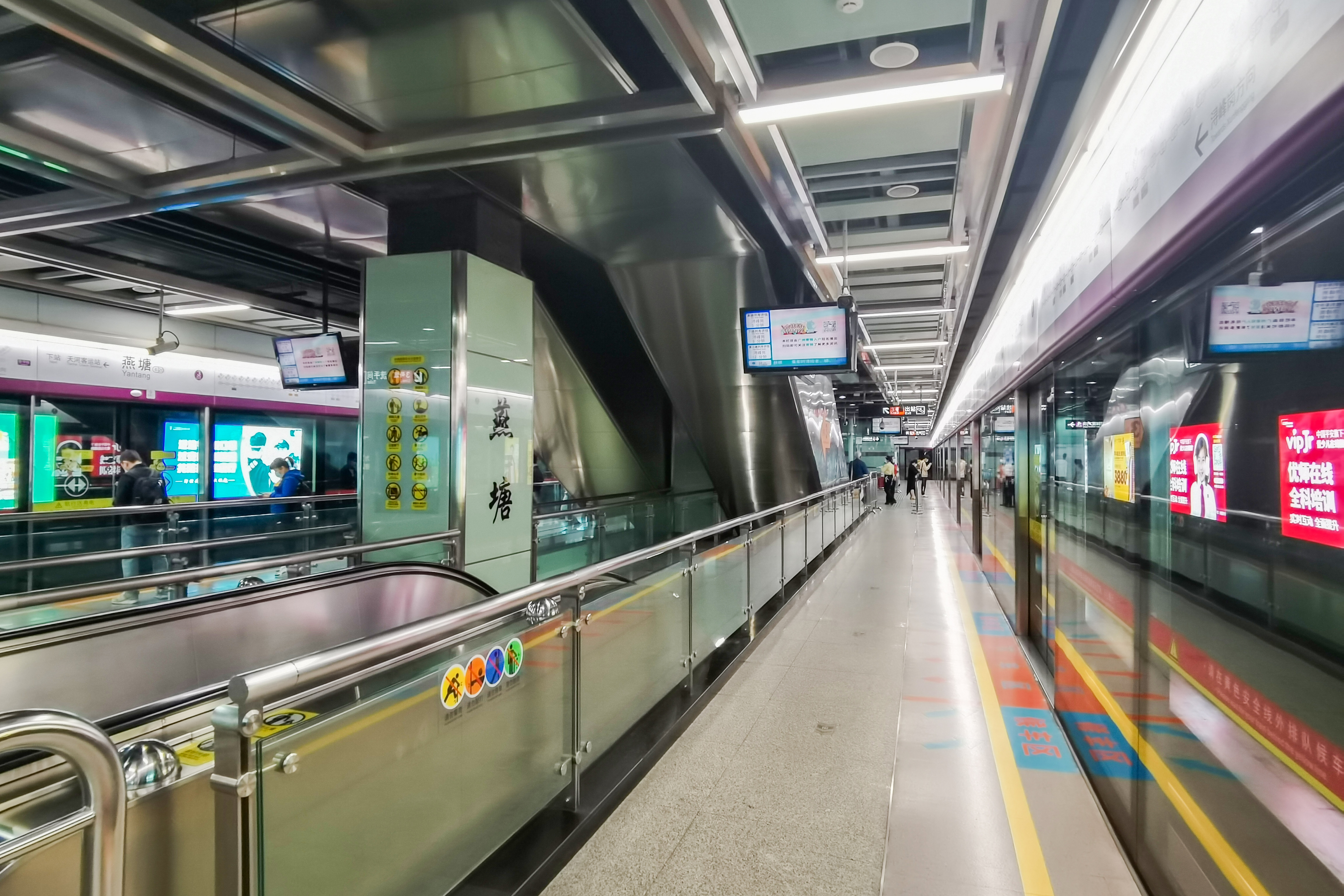 广州地铁燕塘站